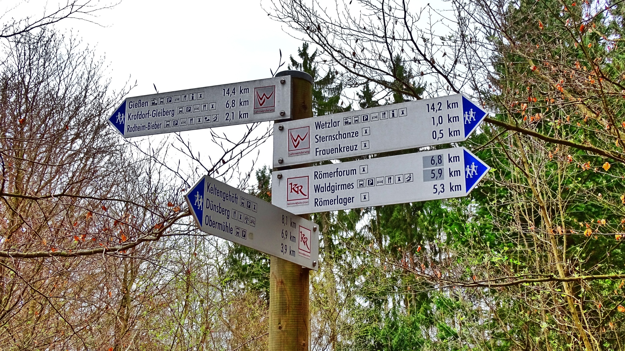 Wegweiser des Lahnwanderwegs am Frauenkreuz bei Lahnau (Lahn-Dill-Kreis, Deutschland).